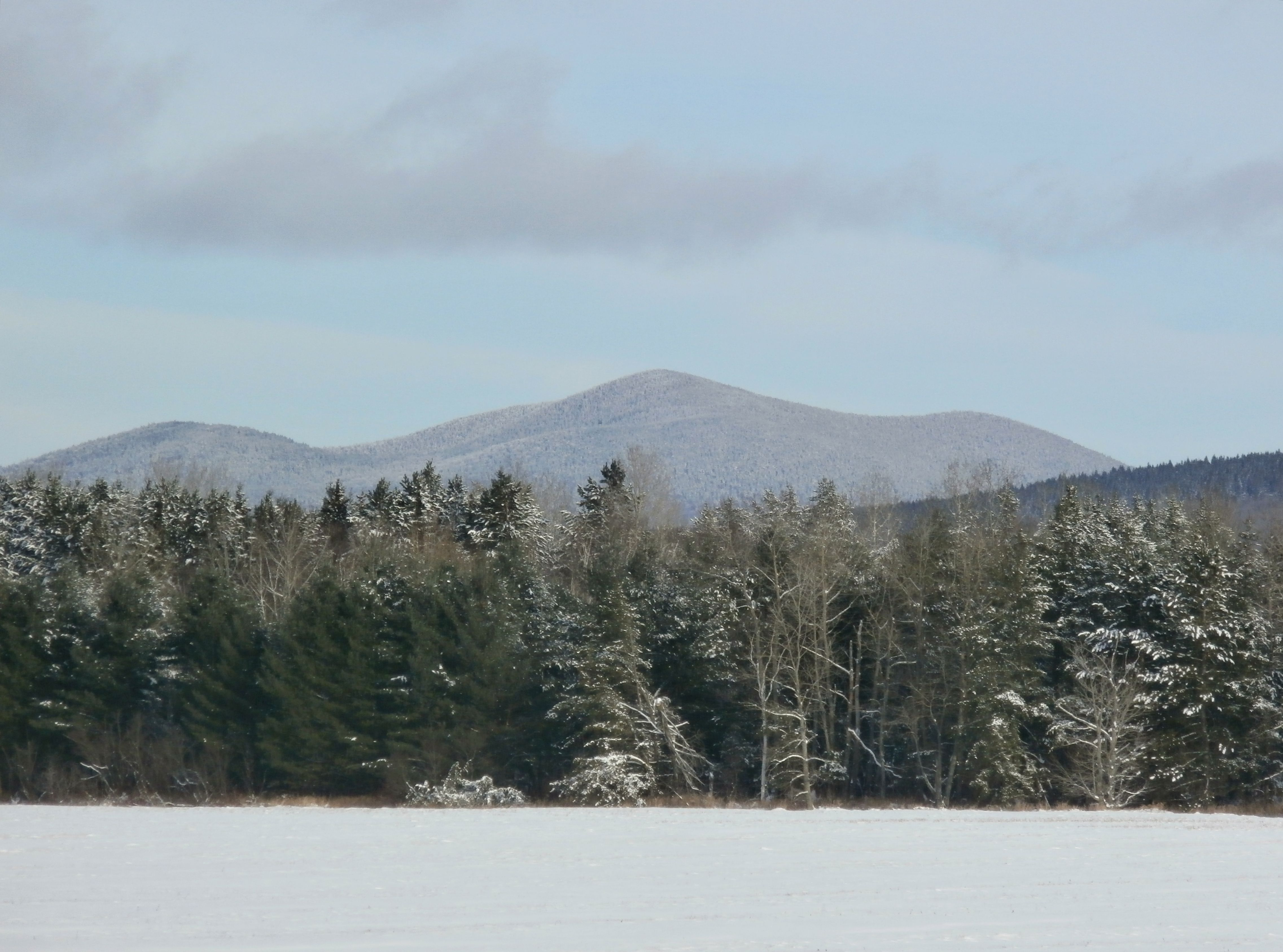 Mont Merrill en hiver.